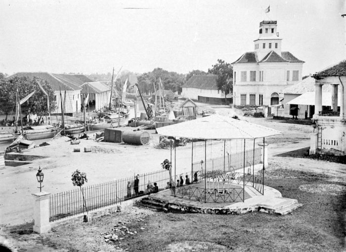 Negatief. Batavia huisvestte de centrale bureaucratie, eerst van de VOC en later van het Nederlandsch-Indisch gouvernement, en Soerabaja was in de 19e eeuw steeds meer een centrum van handel en industrie geworden. Daartussenin lag de derde grote stad van Java's noordkust, Semarang. Die stad had aan het begin van de 19e eeuw een groots verleden maar schijnbaar niet veel toekomst. Het was de hoofdstad geweest van het Gouvernement Java's Noordoostkust, maar Daendels ontsloeg de laatste gouverneur, tot dan toe de machtigste man na de GG, en schafte deze extra bestuurslaag af, waarna de ontwikkeling van de stad stagneerde. (P. Boomgaard, 2001). Gezicht op de rivier, muziektent en uitkijktoren van Semarang